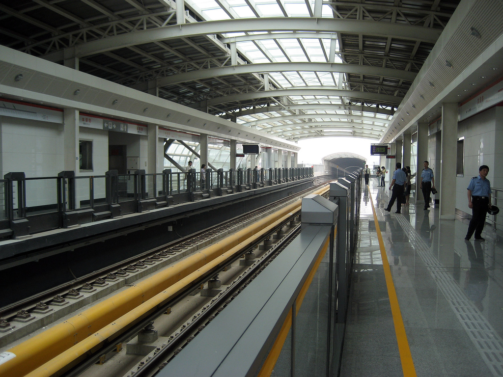 天津地铁地上部分本溪路站.jpg